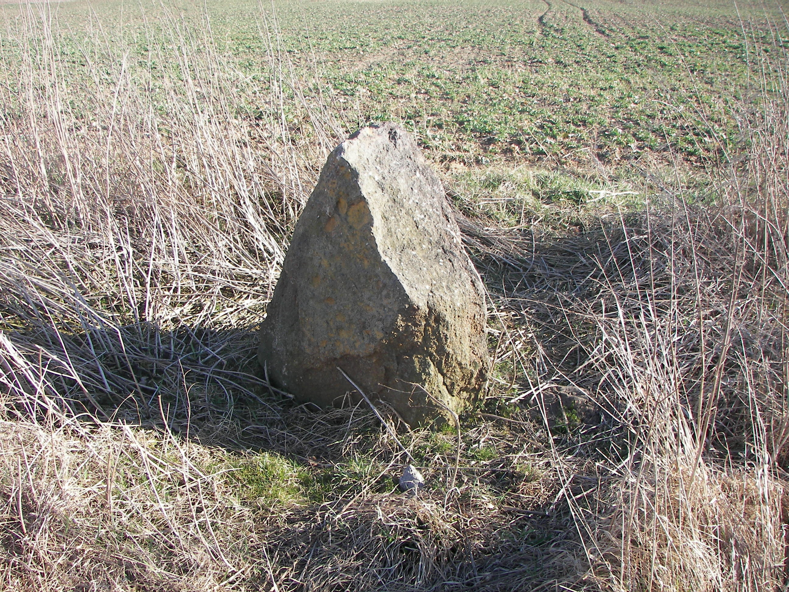 Česky: Menhir, který se nachází mezi Ledcemi, Přelícem a Řisuty